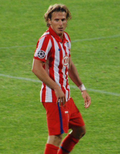 Diego Forlán u dresu Atlético Madrida